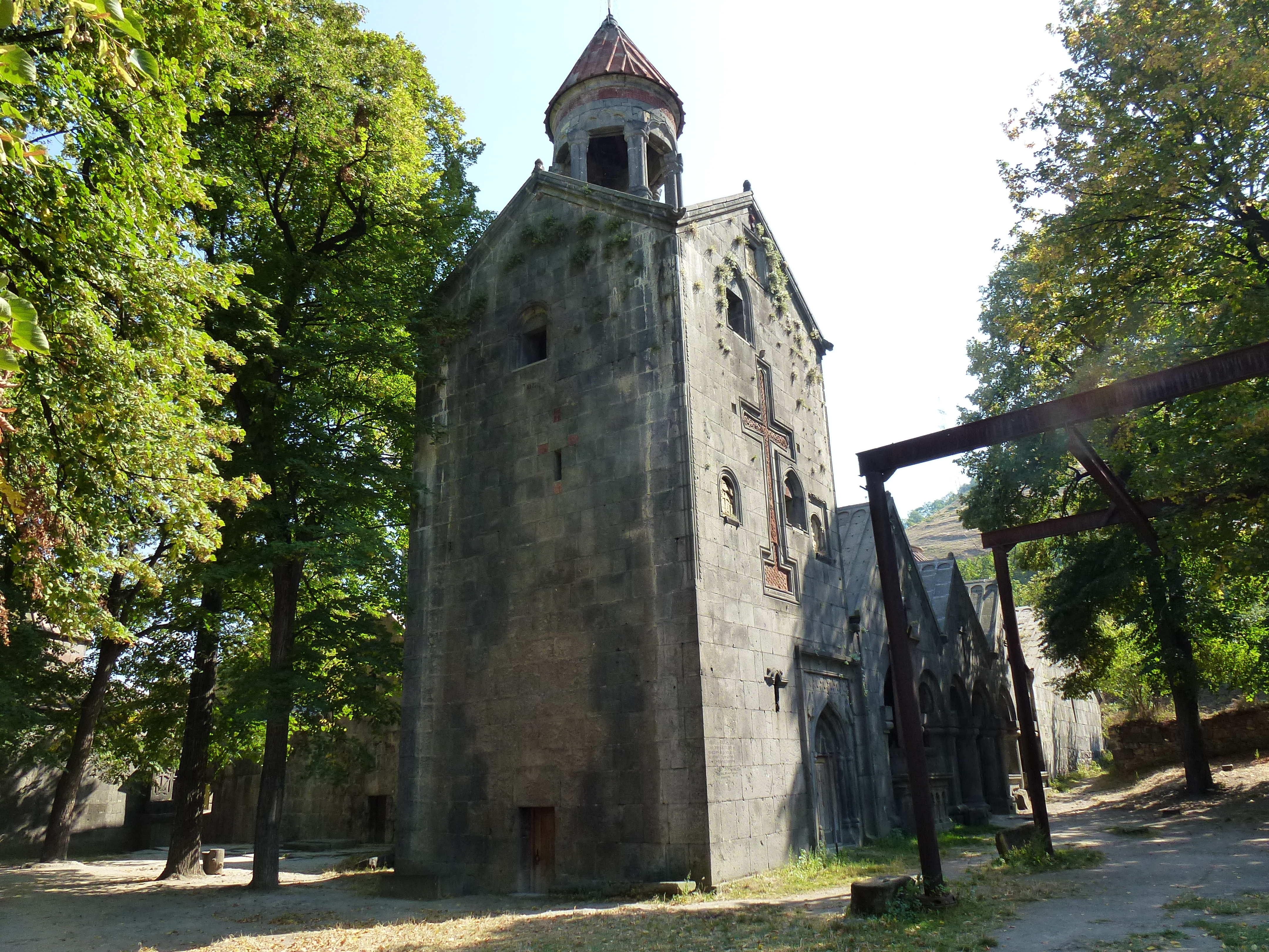 Սանահինի վանական համալիր 2/33